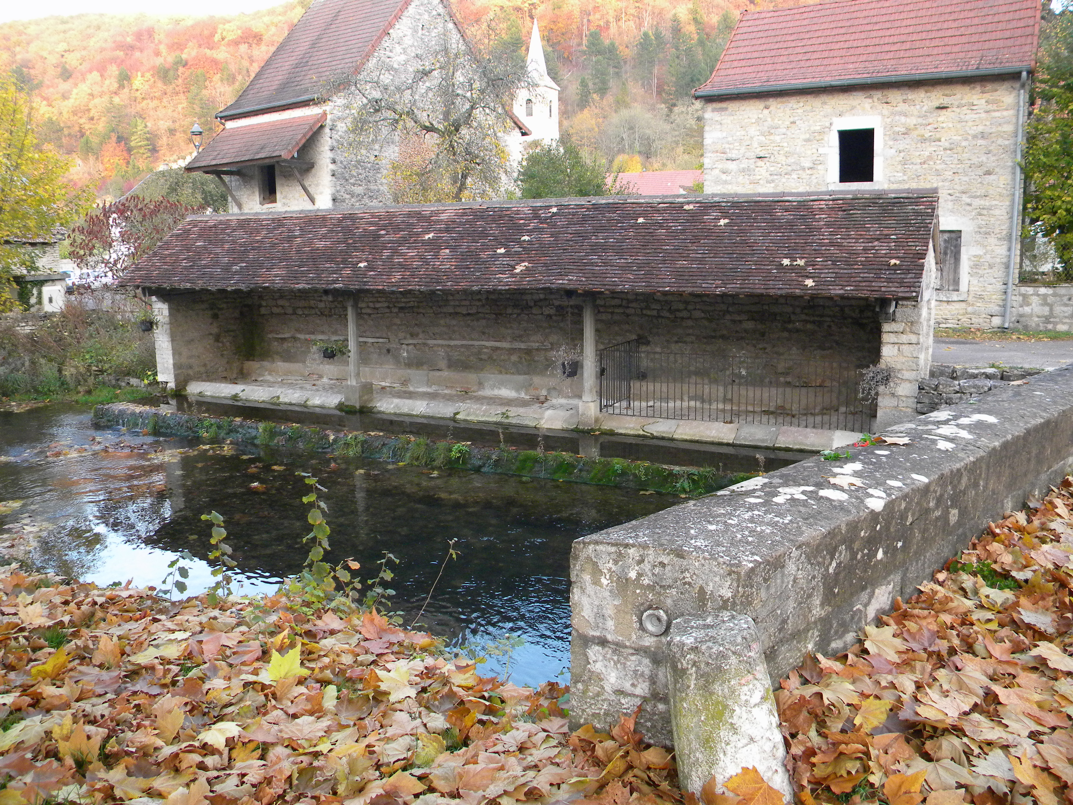 Lusigny-sur-Ouche